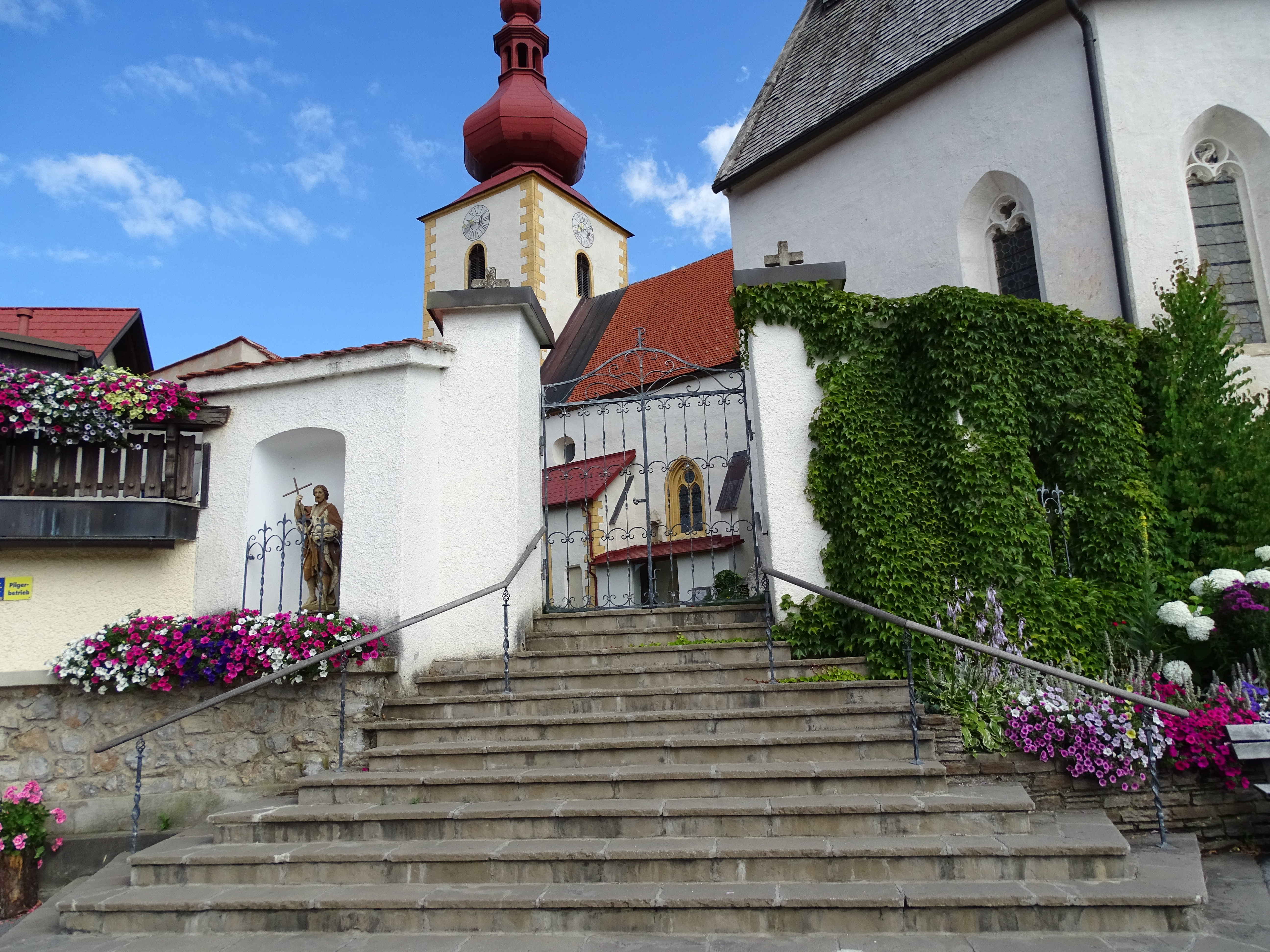 Eine der Stiegen zur Pfarrkirche in Sankt Pankrazen in der Gemeinde Gratwein-Straßengel